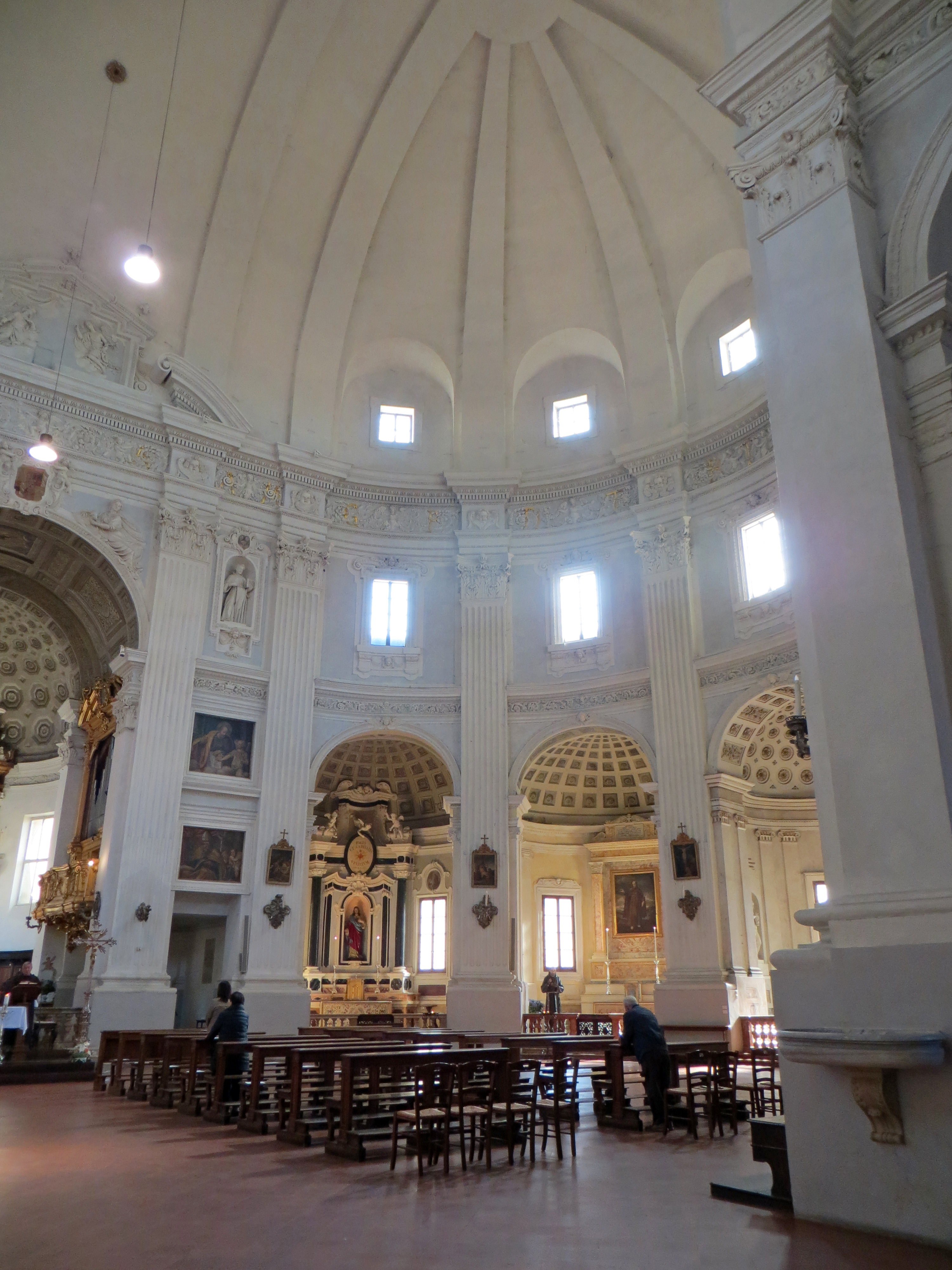 Chiesa della Santissima Annunziata (Parma) - interno